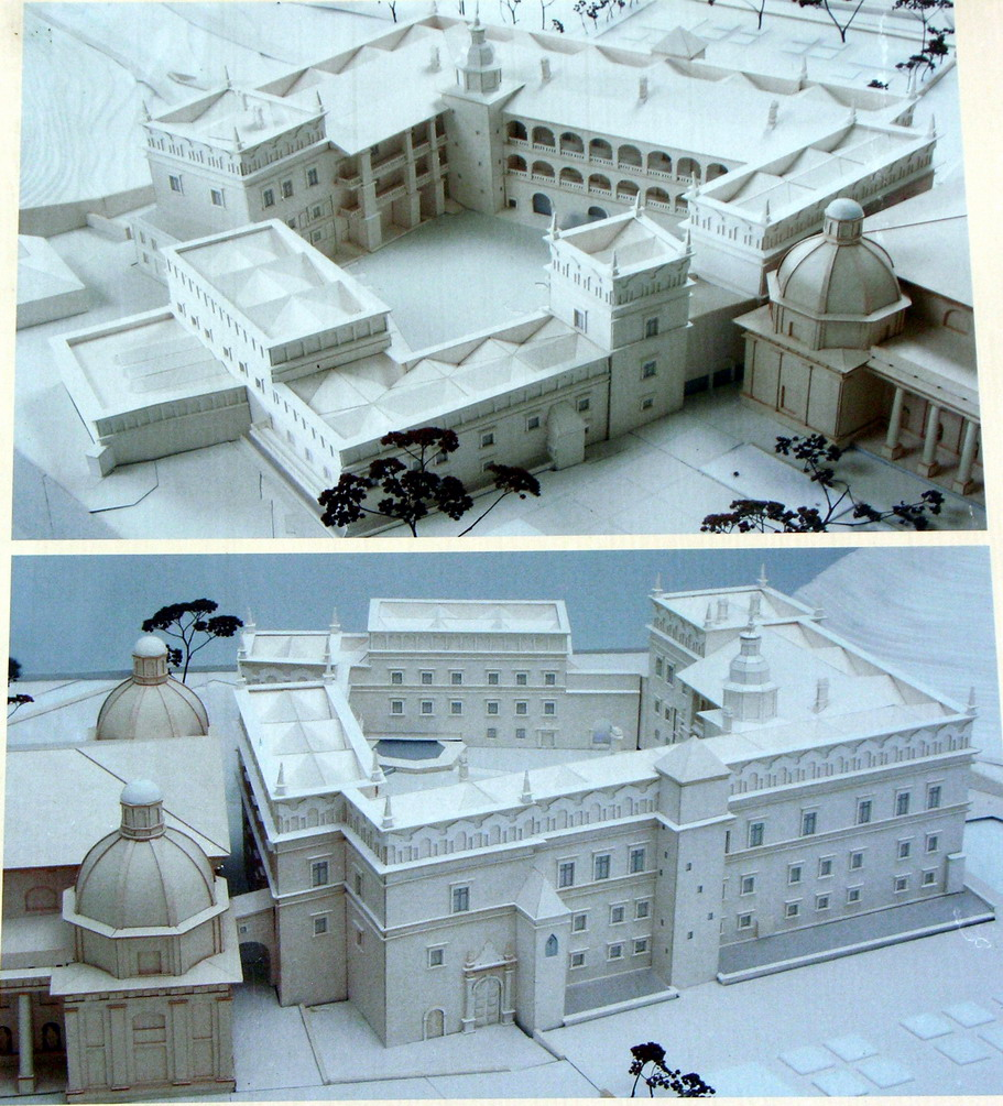 Lietuvos Valdovų rūmų maketas. Model of Royal Palace of Lithuania in Vilnius